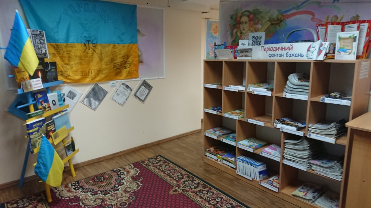 Періодичні видання